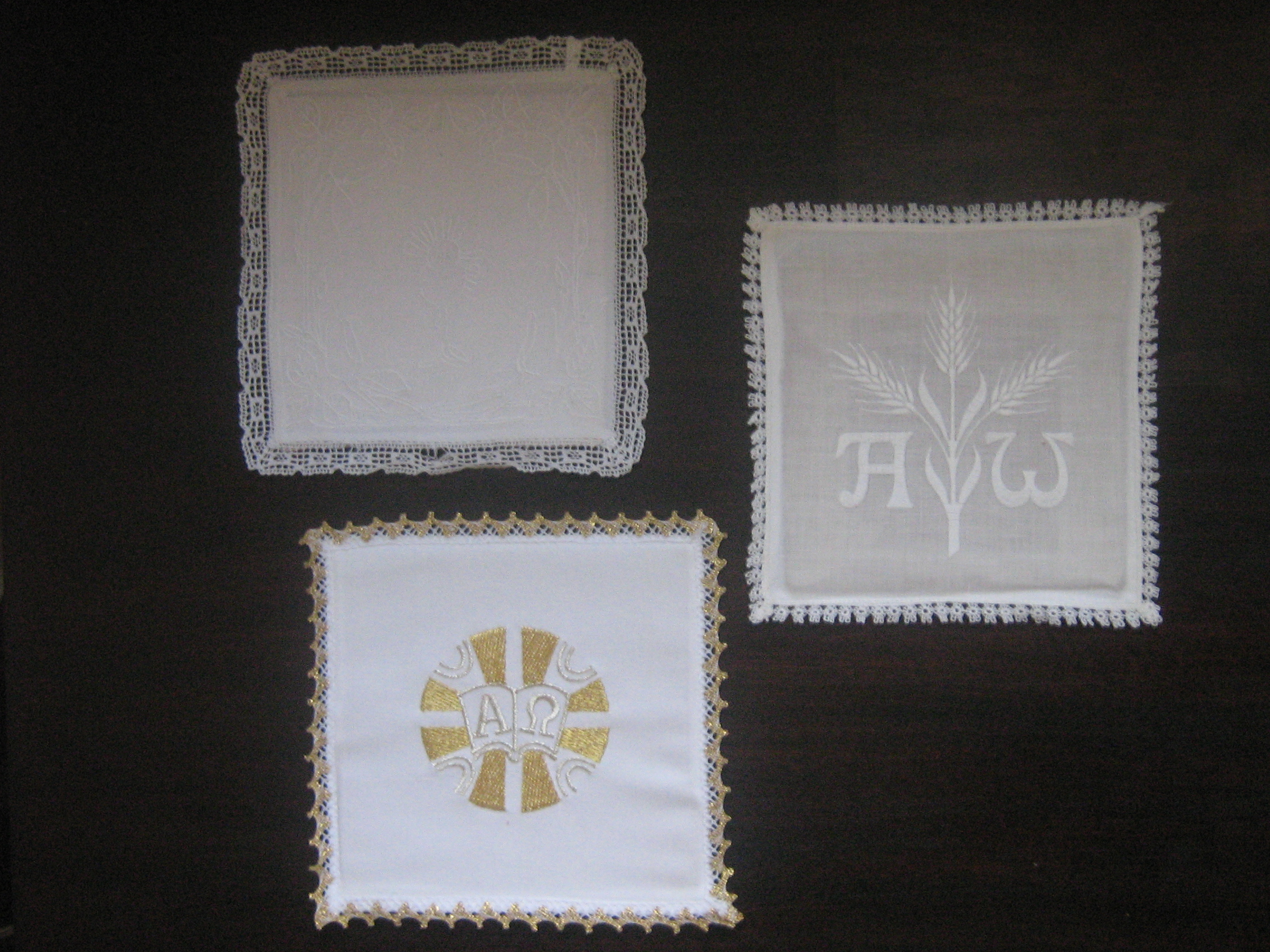 Palki